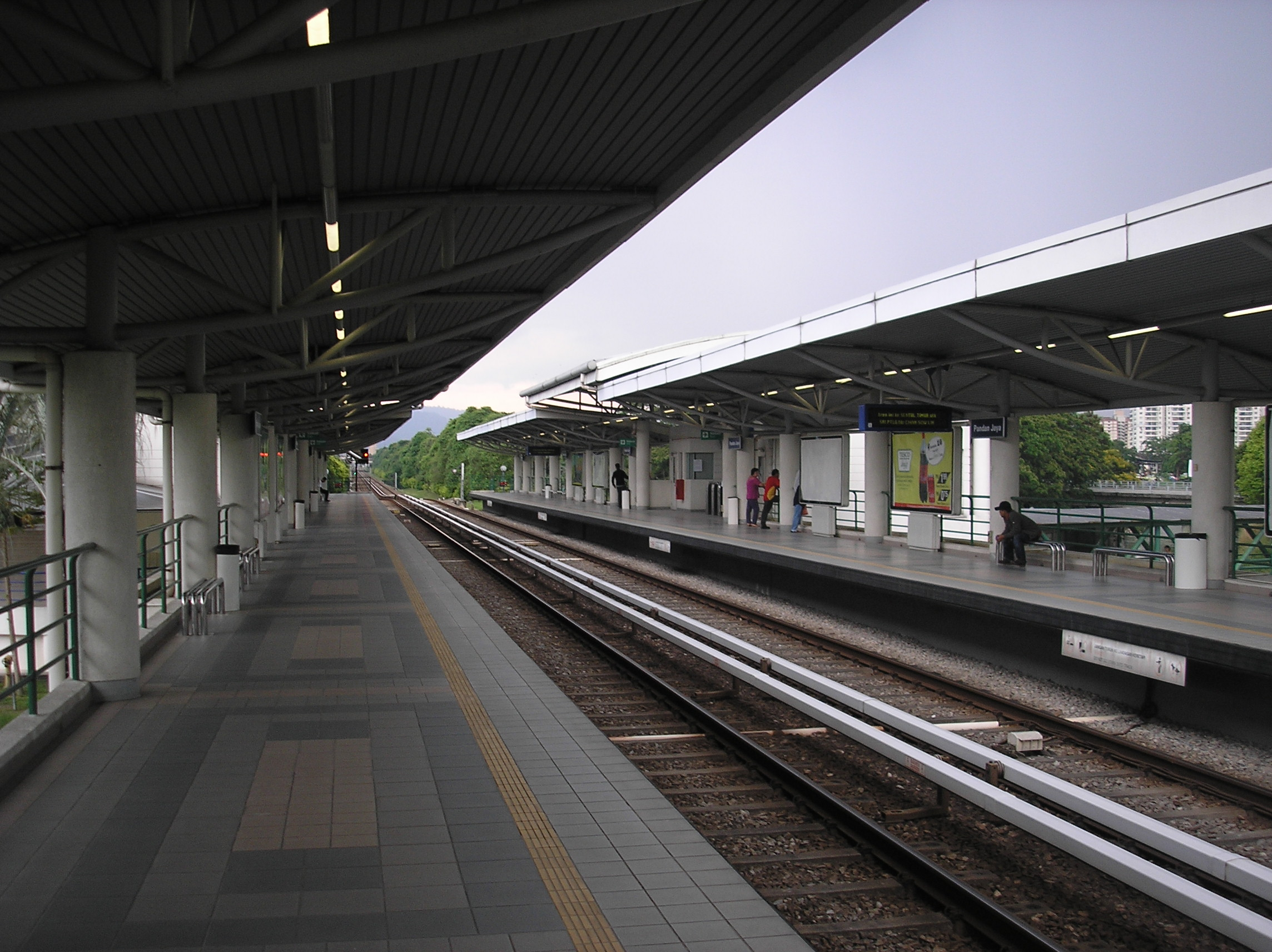 The Pandan Jaya LRT station (Ampang Line), Selangor, Malaysia.